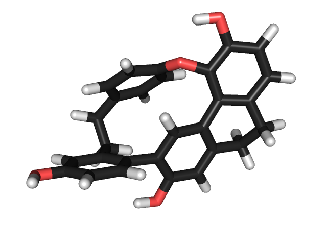 chemical structure of cavicularin